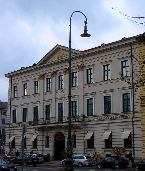 Palais Almeida in Muenchen